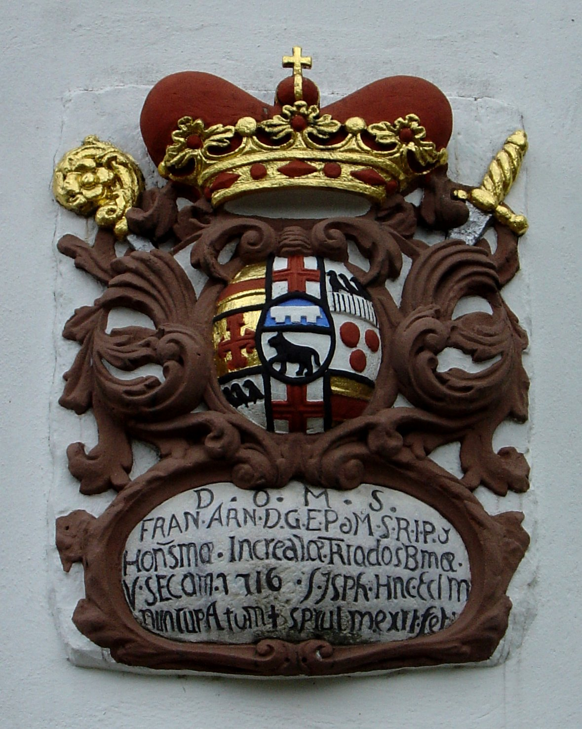 Wappen von Franz Arnold von Wolff-Metternich zur Gracht, Fürstbischof von Paderborn und Münster, an der St. Josephskirche in Delbrück-Westenholz